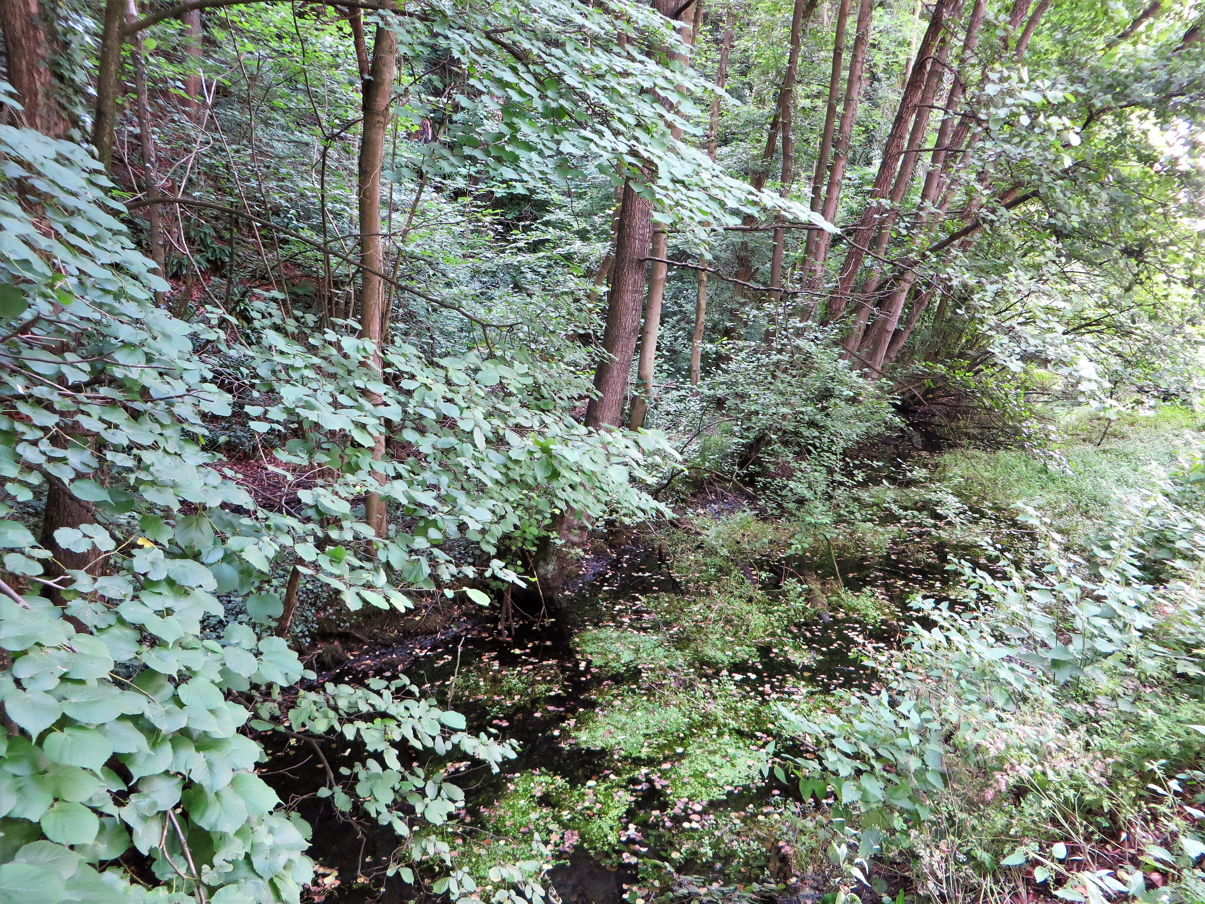 Barmer Teich am Weißenstein in Hagen an der Hohenlimburger Straße (B 7). Der Barmer Teich ist einer der wenigen verkarsteten Quellteiche in Europa und die einzige Vauclusequelle in Westfalen. Gespeist wird diese Karstquelle durch drei Bäche, die von Süden kommend auf den Karst treffen und dort in den Untergrund abfließen (Bachschwinde). Direkt am Fuße des ca. 70 Meter aufragenden Massenkalkkegels „Weißenstein“, mit der archäologisch bedeutenden Blätterhöhle, befindet sich dieser bemerkenswerte Teich, mit seinen artenreichen Wasser- und Uferpflanzengesellschaften als Laichgewässer für Amphibien, wie z.B. Erdkröte, Teichmulch, Alpenstrudelwurm und Quellschnecke. Der Barmer Teich ist Teil des Naturschutzgebietes „Mastberg und Weißenstein“.